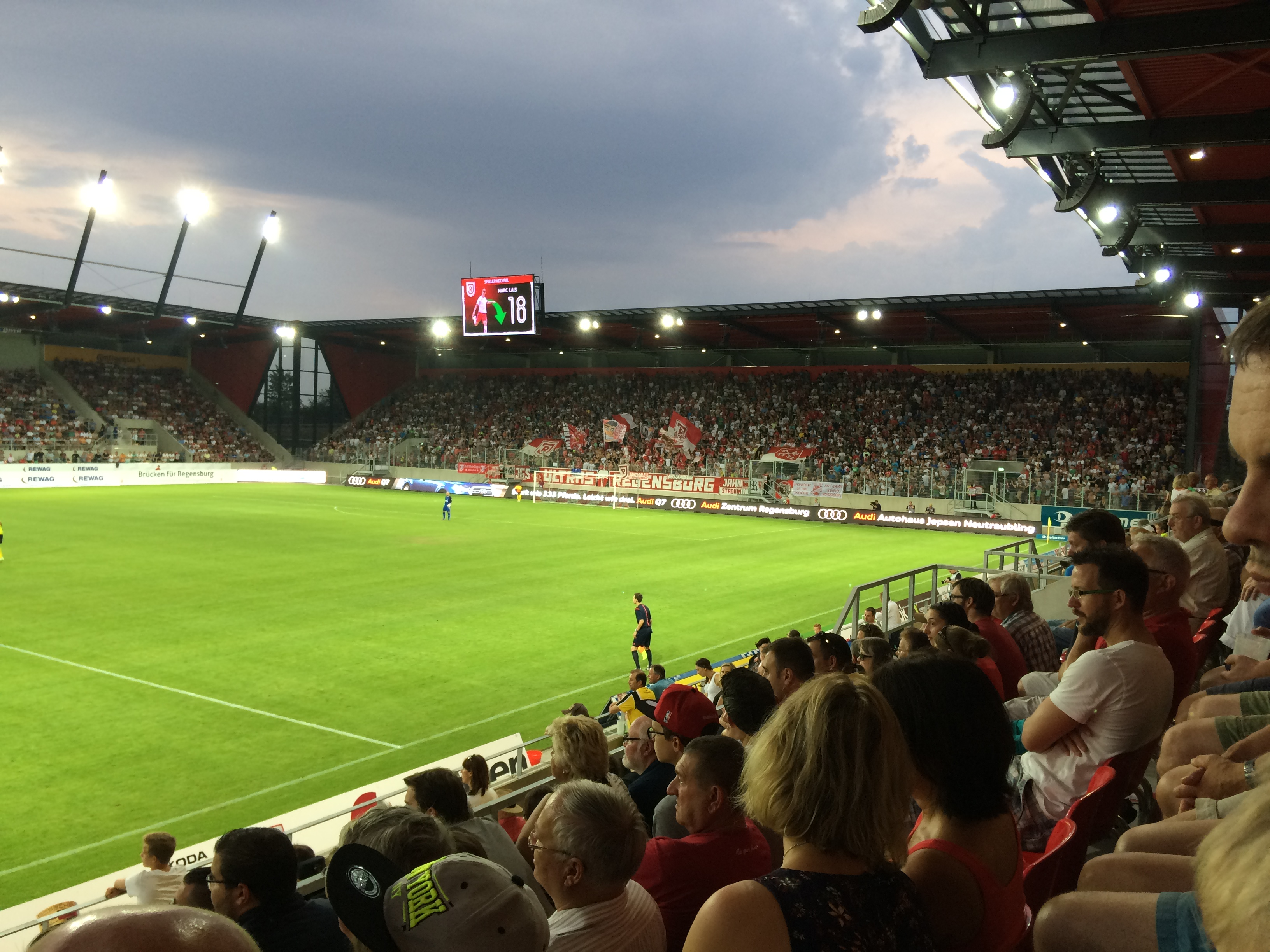 Die Hans Jakob-Tribüne (Heimat der Fans des SSV Jahn Regensburg) beim Regionalligaspiel SSV Jahn Regensburg - FC Amberg in der Saison 2015/2016